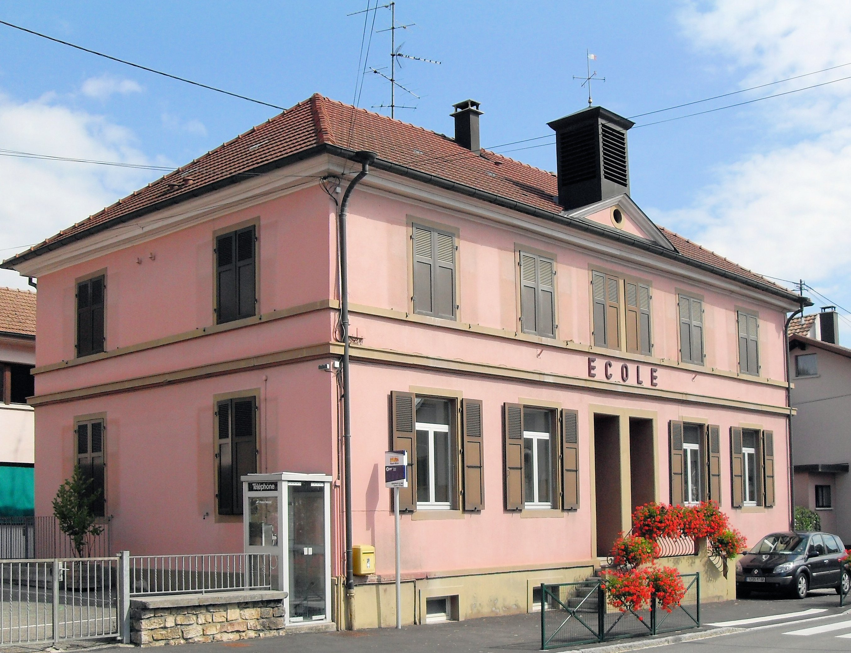 L'école primaire de Ranspach-le-Bas